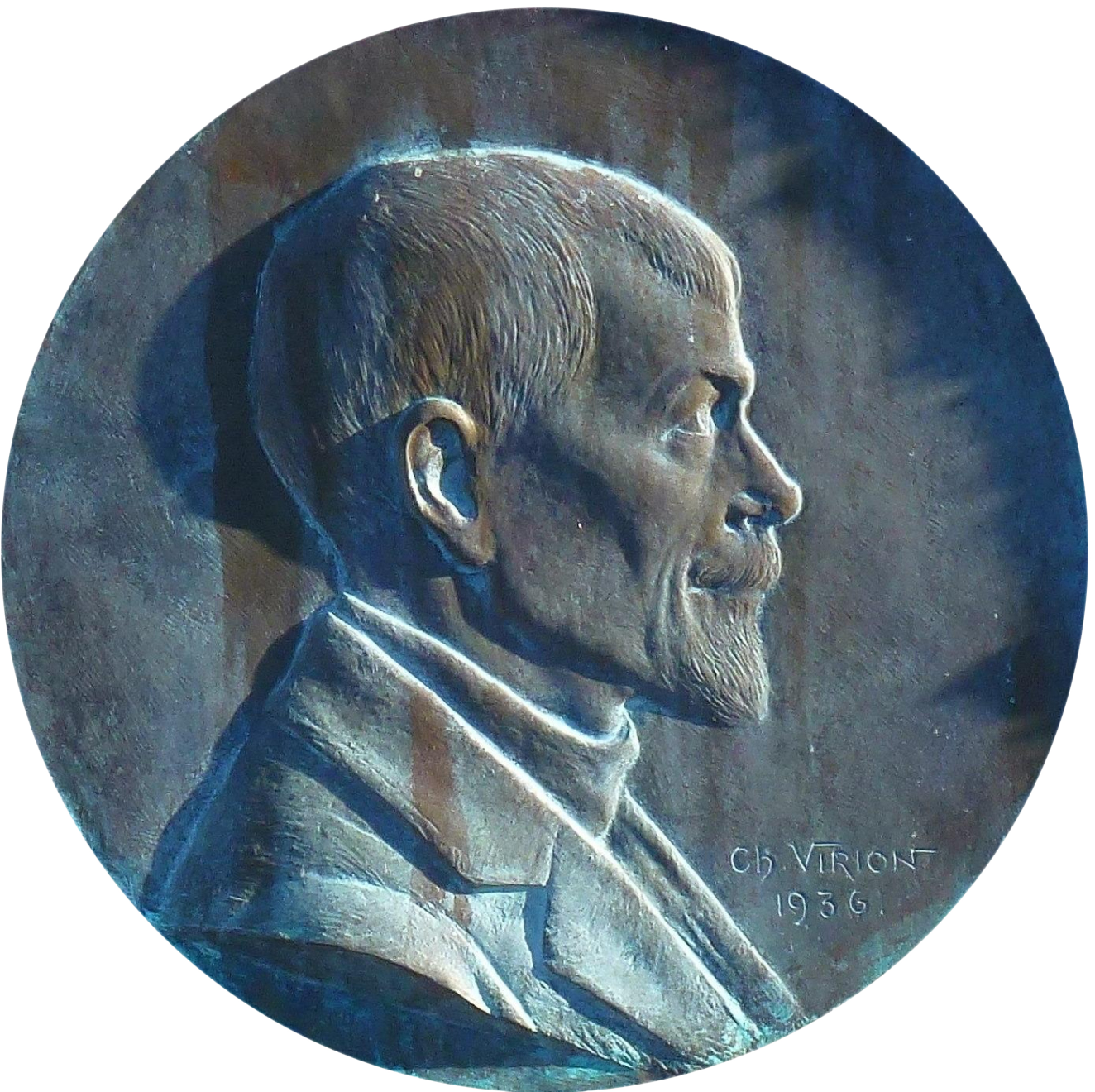 Sculpture sur la pierre tombale d'Abel Mignon réalisée par Charles Virion en 1936